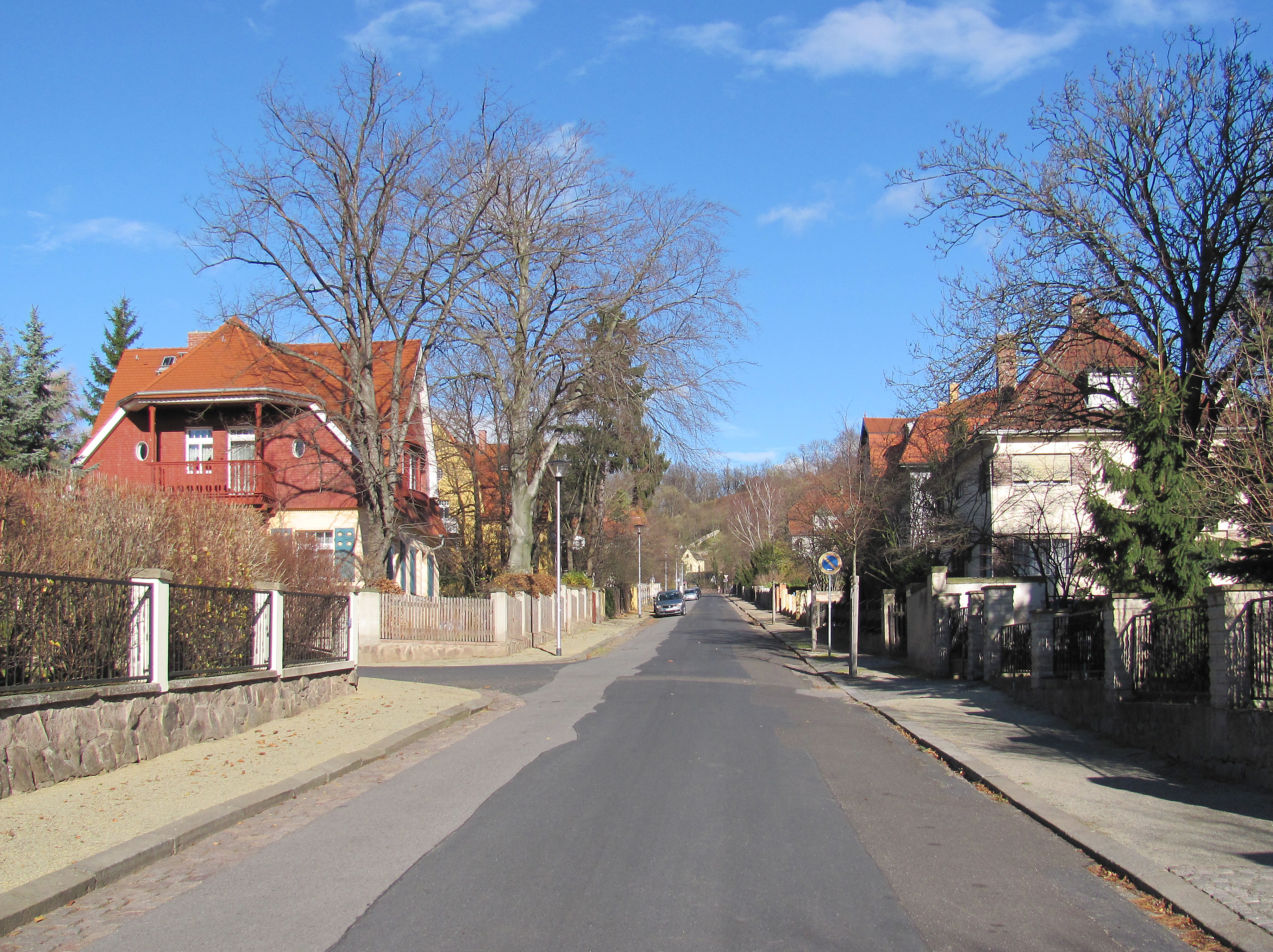 Radebeul, Lindenaustraße, Blick Richtung Norden, li. Landhaus Lutzmann, re. Einfamilienhaus Bernhard Hartmann